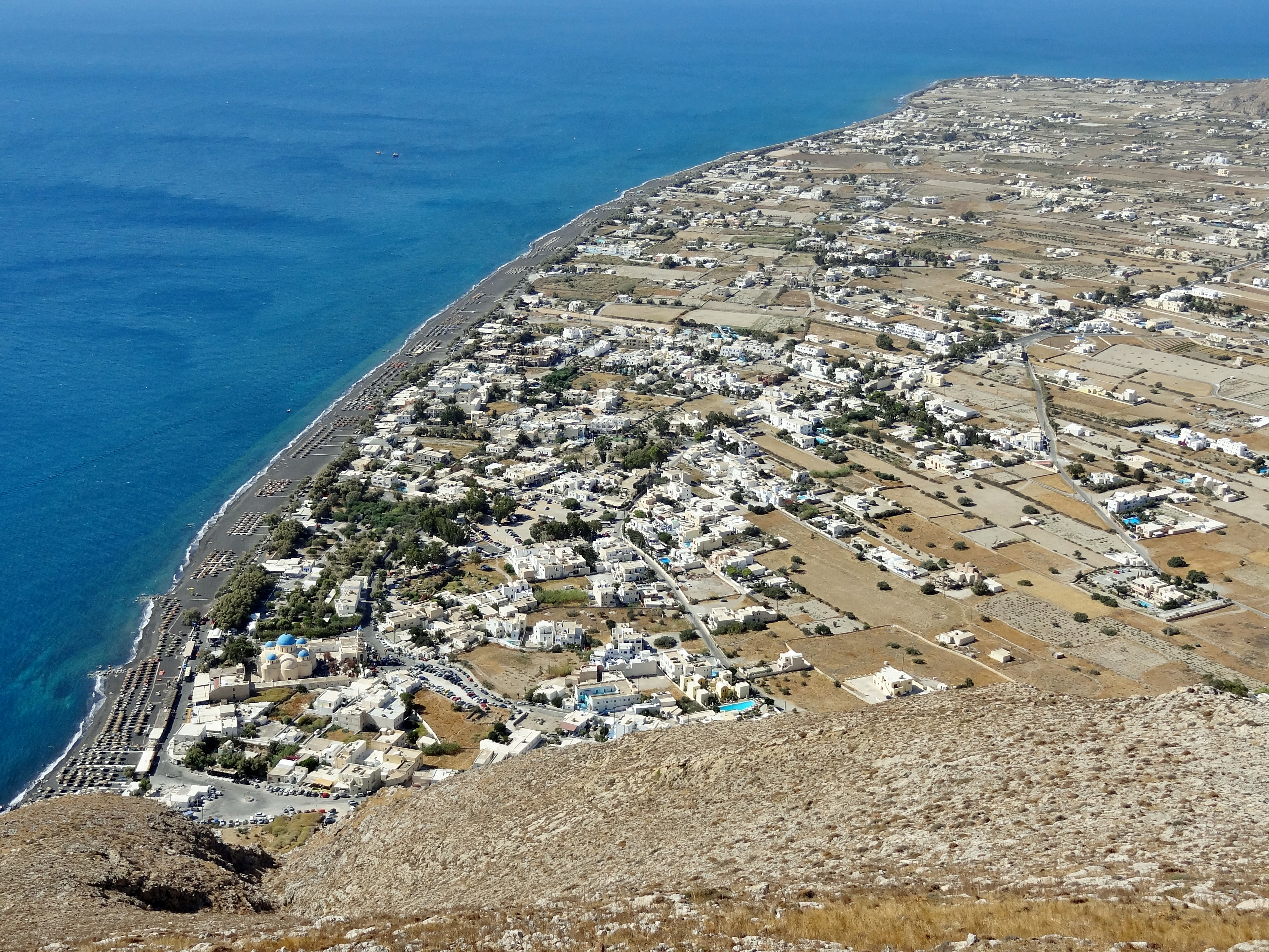 Perissa (Περίσσα), Santorin (Thera), Kykladen, Griechenland